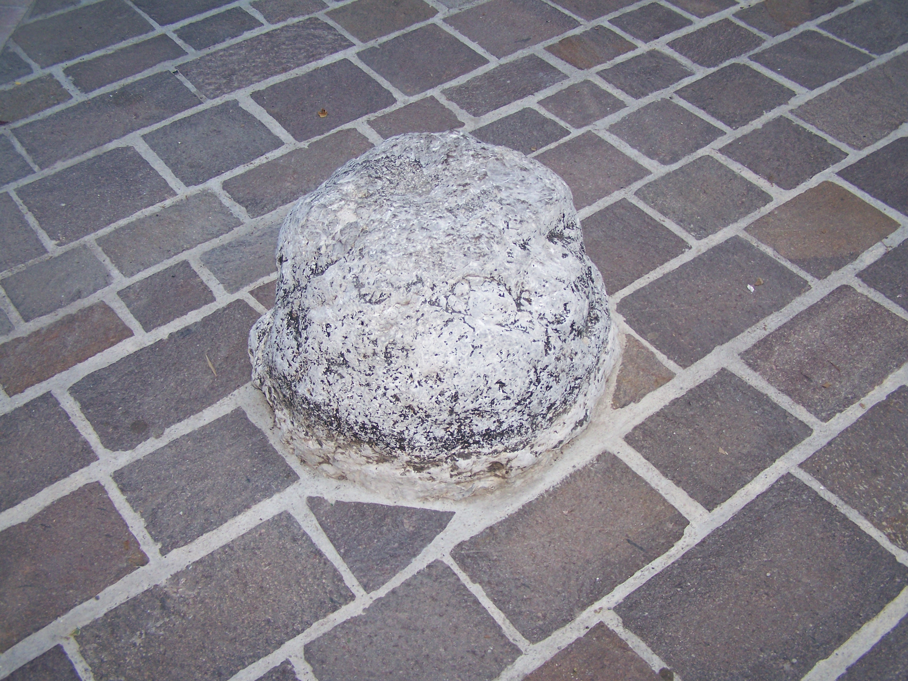 Le Battaù est une pierre symbolisant le "ventre du Seigneur Grimaldi" sur laquelle sautent et dansent les levensois en souvenir de leur indépendance en 1621.